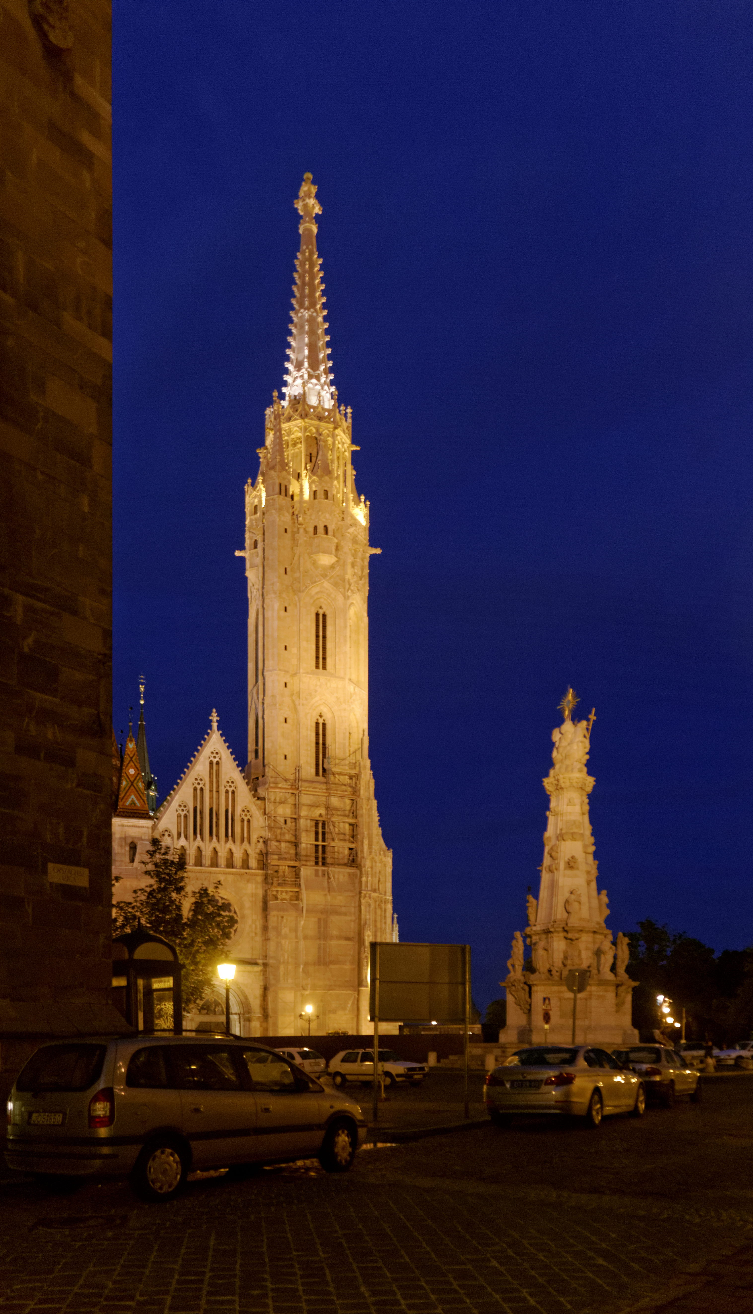 Matthiaskirche Budapest by night